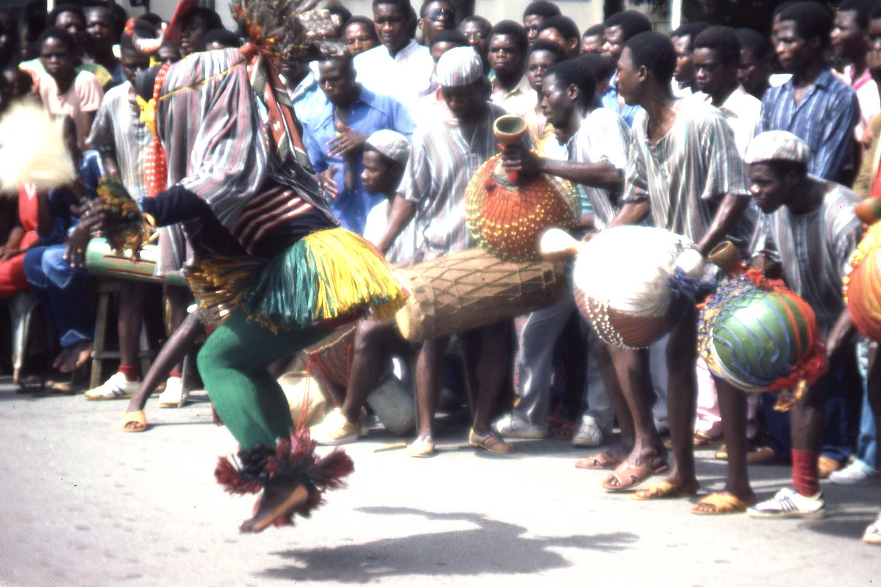 Danses de Cote d'Ivoire